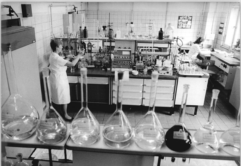 Schwarzheide, Synthesewerk, Labor ADN-Link 14-5-90-Bezirk Cottbus: Umweltschutz-Wasseranalytik in der Industrieabwasserbehandlung- Zur Gewährleistung einer kontinuierlichen Überwachung aller Prozesse und Verfahren in der Industrieabwasserbehandlung bis zur umweltgerechten Ableitung des gereinigten Abwassers in den Vorfluter, die Schwarze Elster, wird in den Laboren der Hauptabteilung Umweltschutz im VEB Synthesewerk Schwarzheide rund um die Uhr gearbeitet. In einem Biolabor (Foto) werden unter anderem auch Routineanalysen zur Toxizität des Abwassers, zur Wasserzusammensetzung, zu Wasserinhaltsstoffen und zur Wassergüte vorgenommen.